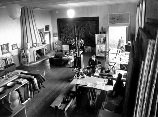 Konstnären Isaac Grünewald i sin ateljé i Grünewaldvillan. Det stora bordet lät han snickra till av de grova plankor som sågades ur väggen när ateljén byggdes till. Numera är rummet utställningsgalleri.